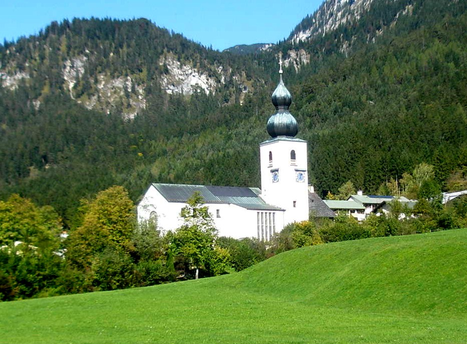 Römisch-katholische Filialkirche St. Johann Nepomuk in Winkl